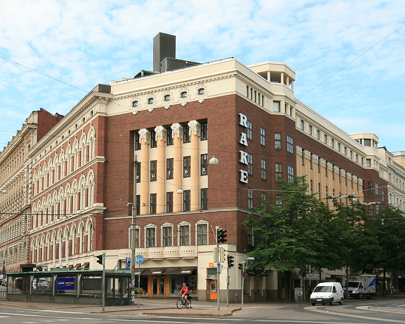 Erottajankatu 4/Bulevardi 2-4, Helsinki. Built 1913. Architect: Lars Sonck.